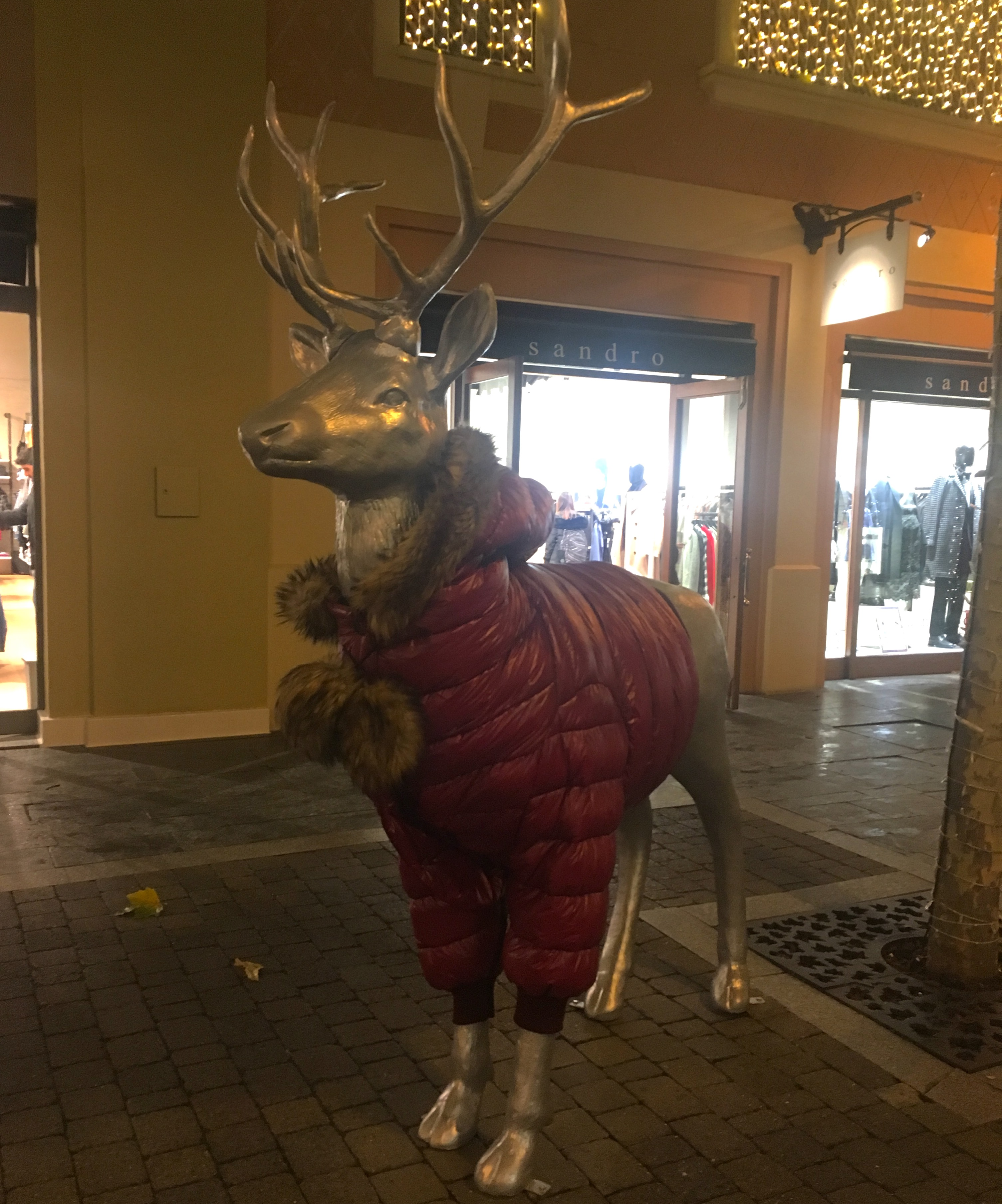 Venado en Las Rozas Village (Madrid) durante las celebraciones navideñas.